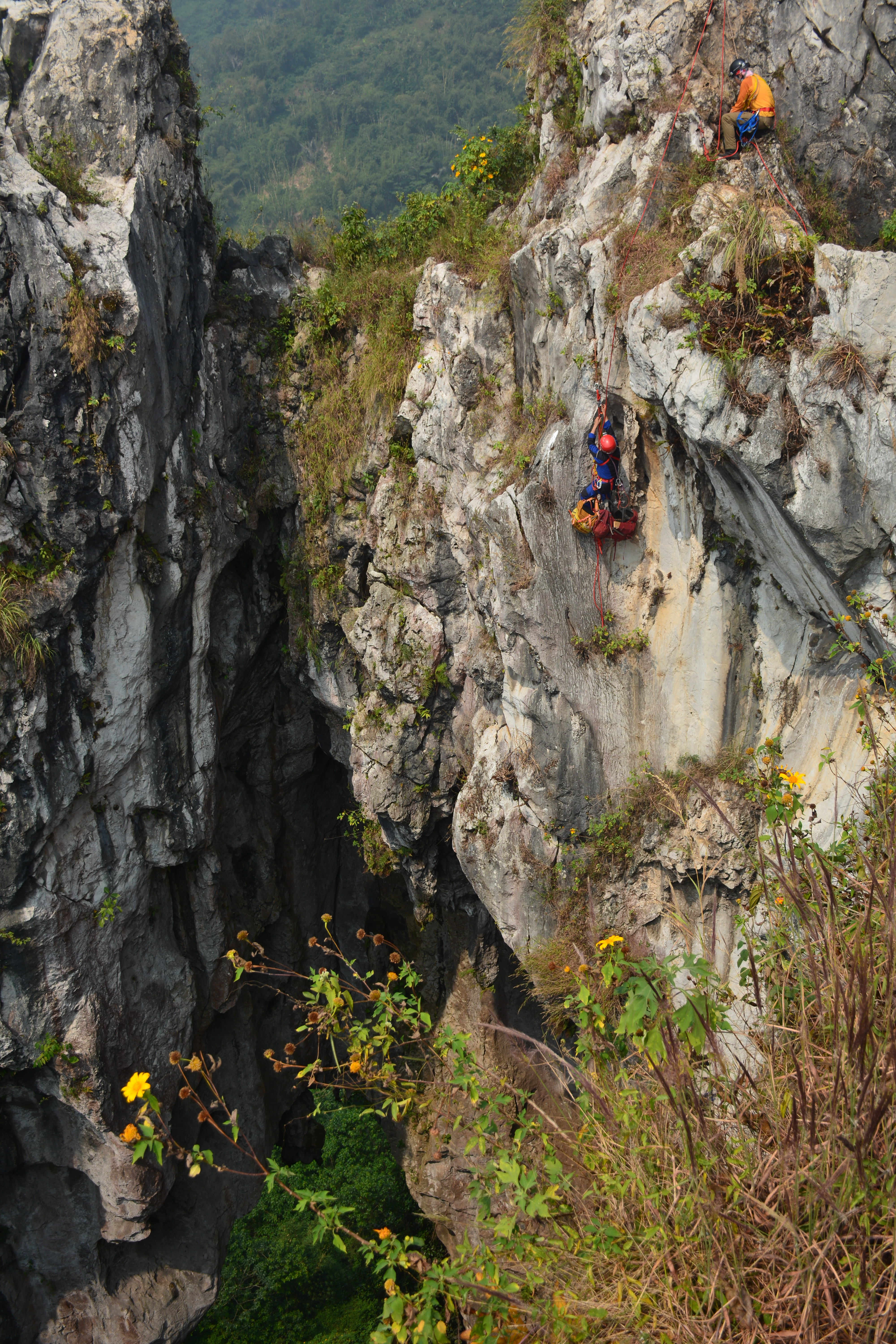 Seorang pemanjat tebing wanita tengah menuruni tebing Citatah dengan bantuan tali Kernmantle